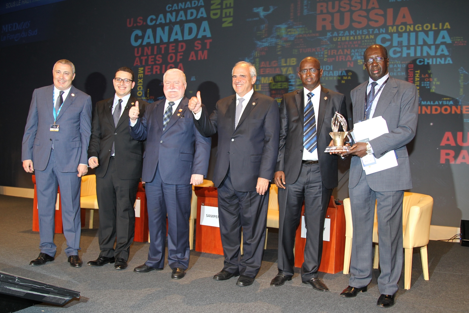 Photo prise à l'issue de la Cérémonie d'Ouverture des MEDays 2012 le 14 novembre 2012 à Tanger. Thami Ghorfi, Brahim Fassi Fihri, Ernesto Samper, Lech Walesa et Abdou Latif Coulibaly